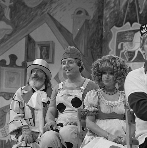 Pieke Dassen, Aart Staartjes en Jennifer Willems in de Nederlandse kinderserie De film van Ome Willem in 1981